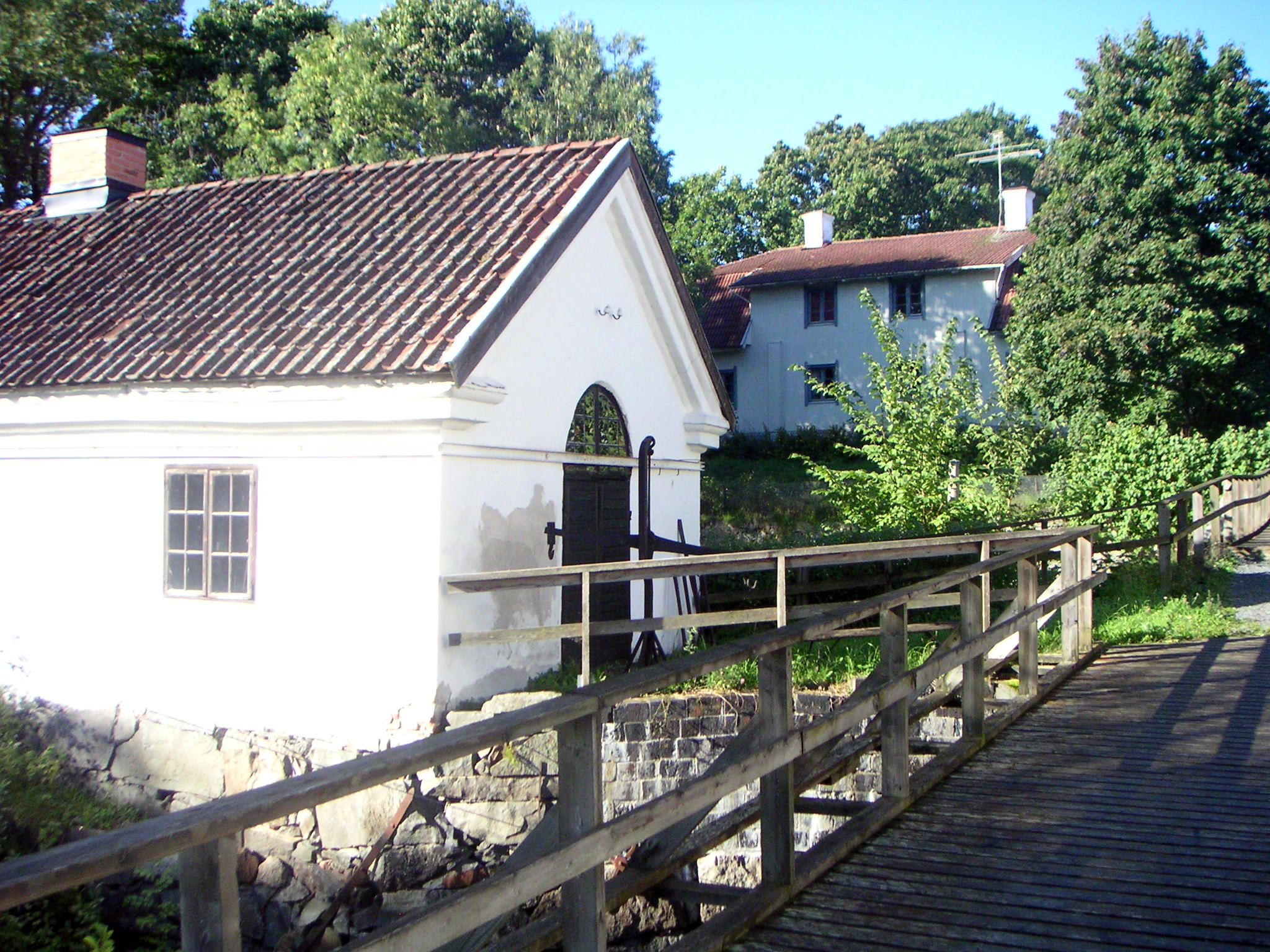 Karmansbo bruk - klensmedjan